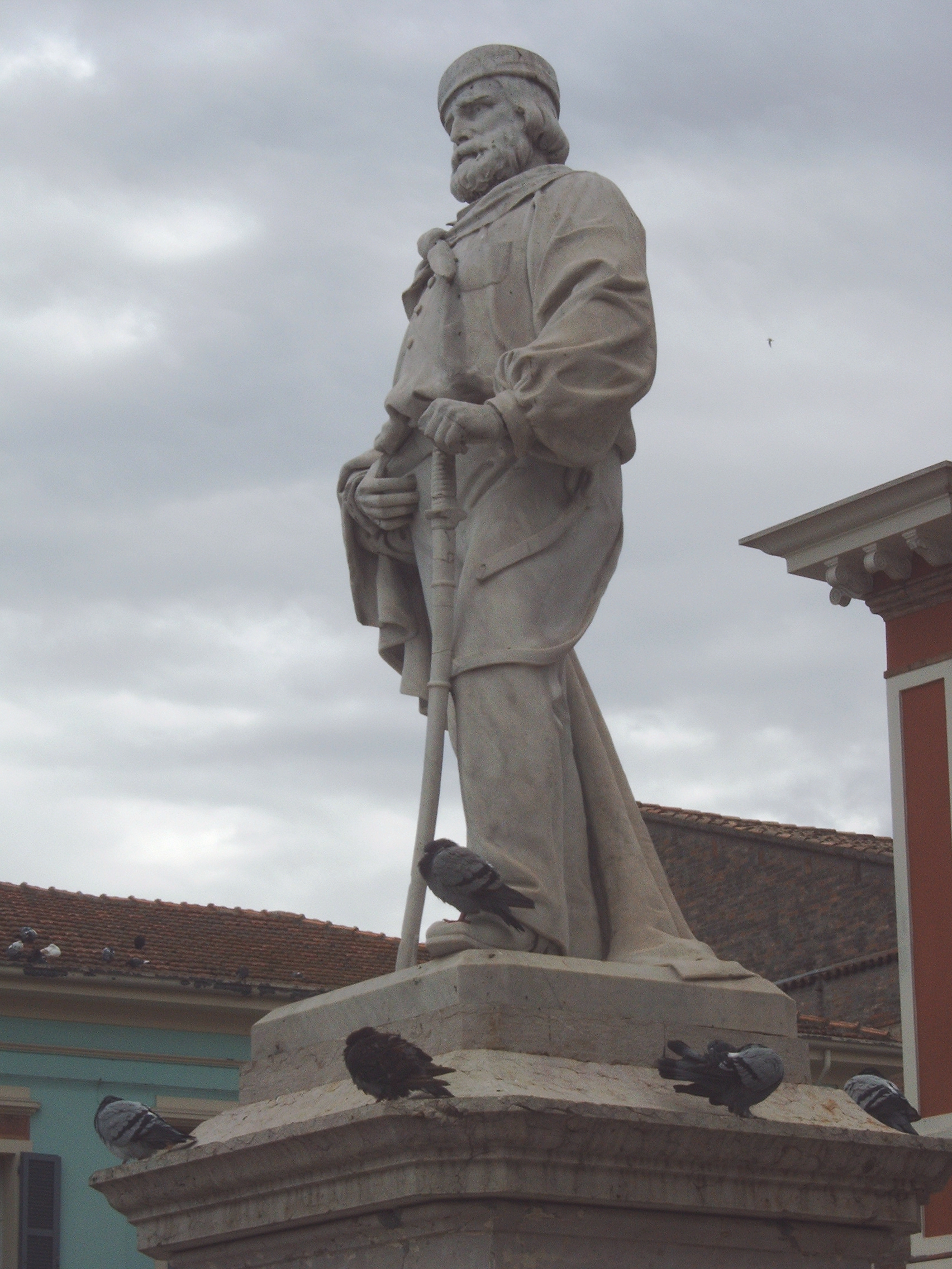 Garibaldi-Denkmal in Cesenatico Aufnahme: September 2005 Url